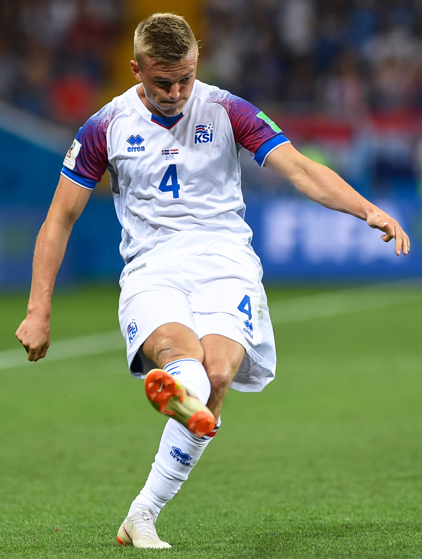 Сборная Исландии уступает Хорватии и покидает ЧМ-2018